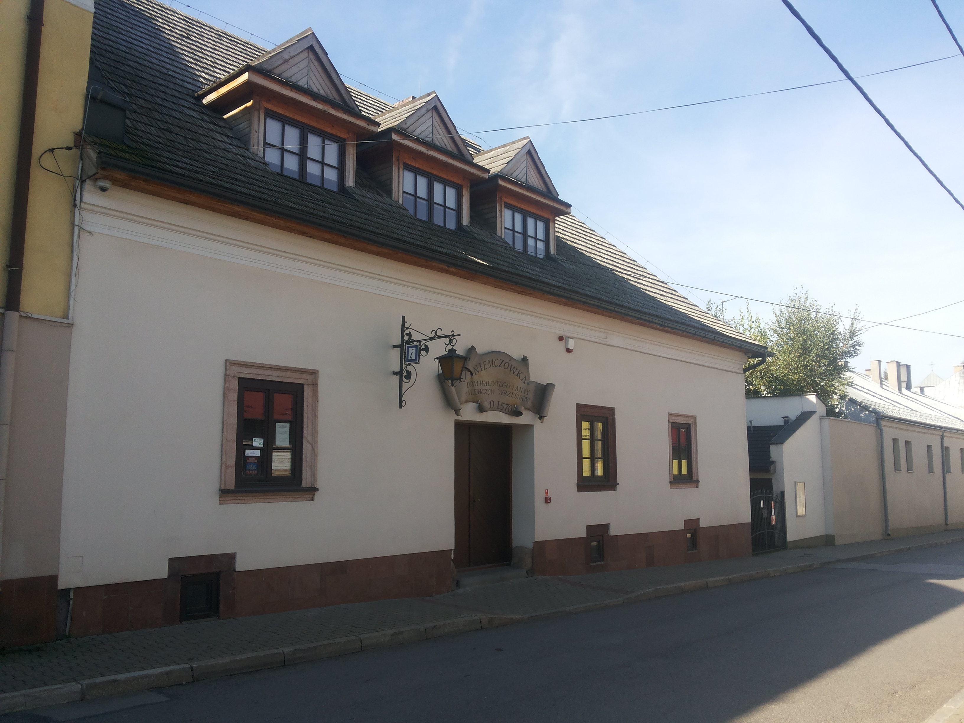 Chęciny, dom „Niemczówka”, 1570, 1634 r., XIX w.